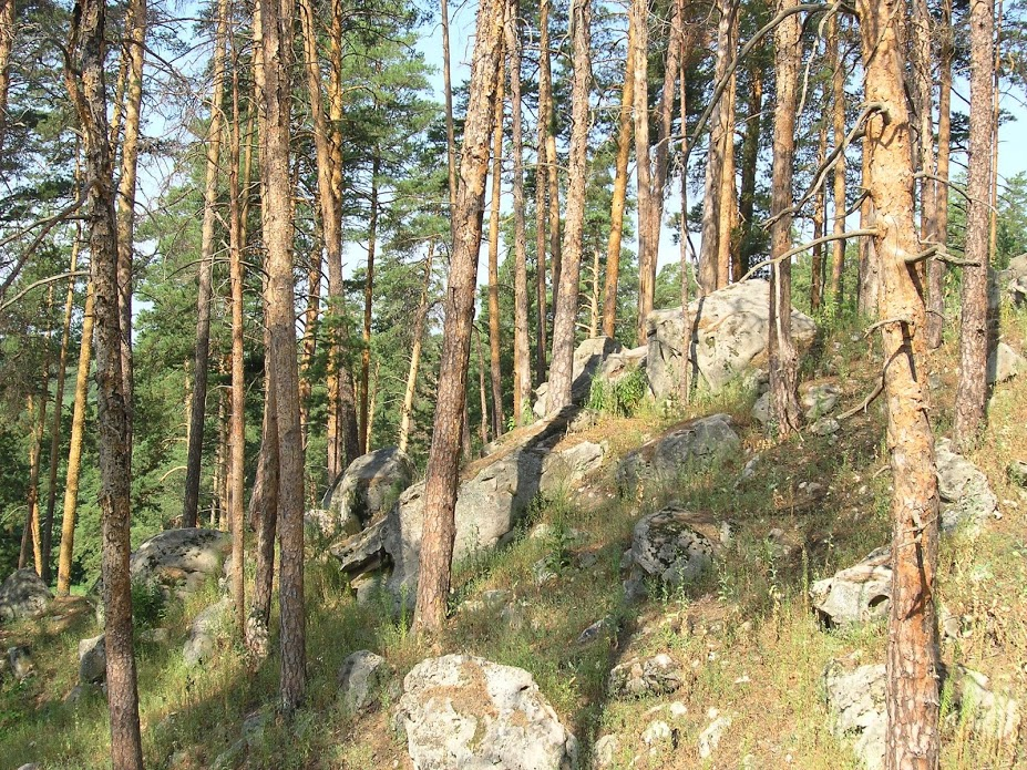 Памятник природы "Малоусинские нагорные сосняки и дубравы". Склон Гремячинских высот